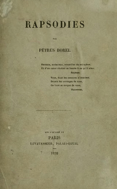 Rapsodies